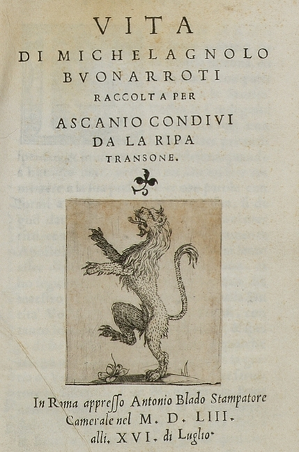 Vita di Michelagnolo Buonarroti raccolta per Ascanio Condivi da la Ripa Transone Title page